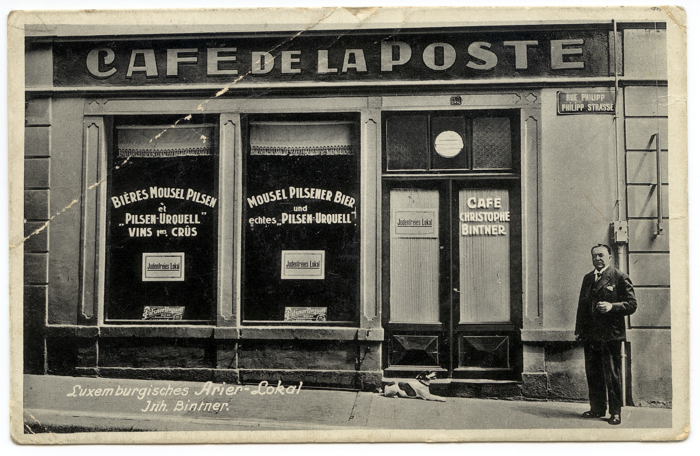 Enn 1932 huet de Christophe Bintner de Café de la Poste an der Philippsgaass an der Stad iwwerholl an doraus säi "Luxemburgisches Arier Lokal" gemaacht. Op dëser Publicitéitspostkaart poséiert de Wiert zesumme mat sengem Wuechthond viru sengem "Judenfreien Lokal".